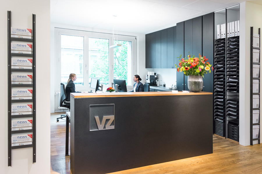 VZ VermögensZentrum in Zürich